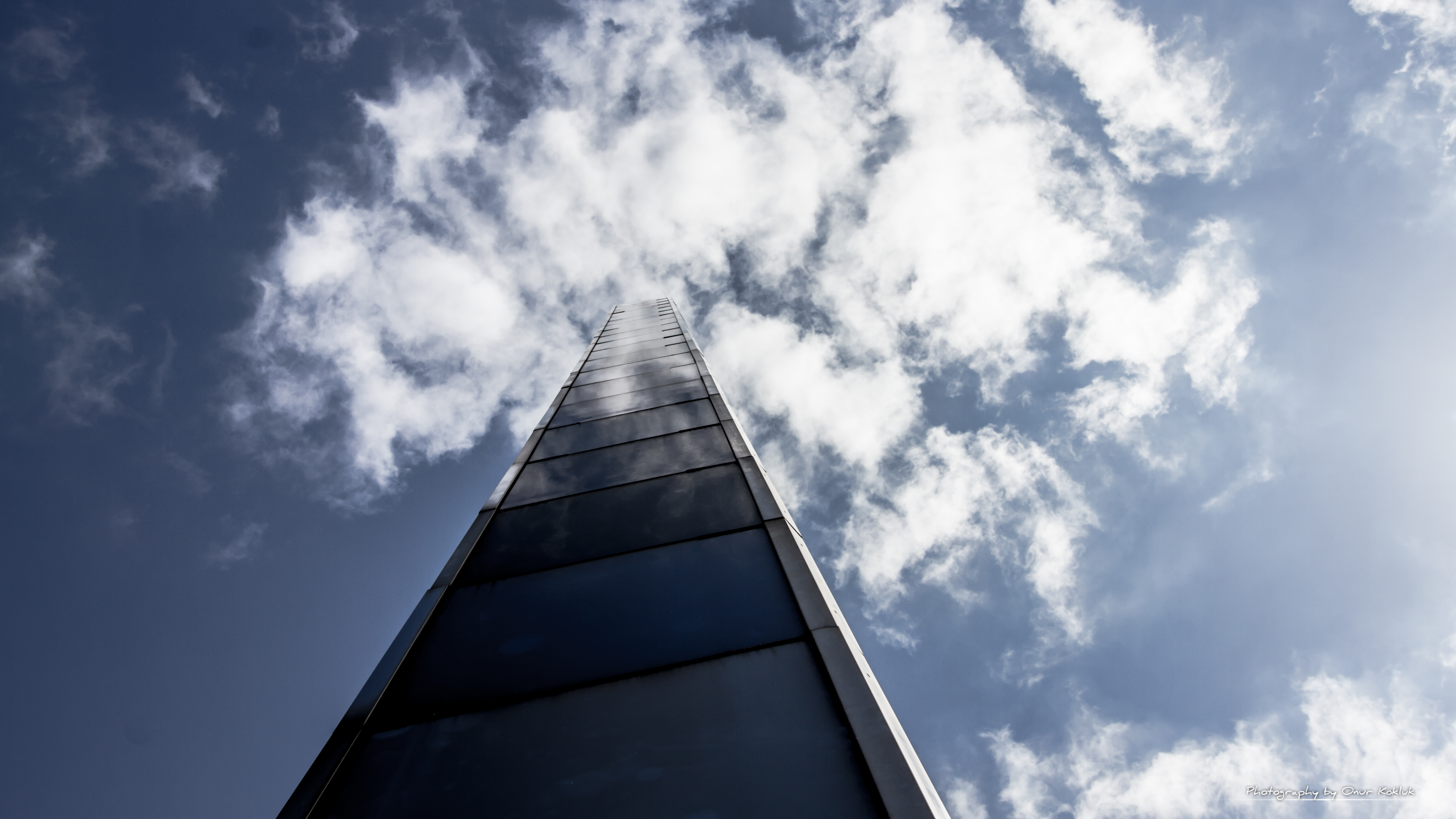 "Gelsenkirchener Prisma", Lichtkunstobjekt von Jürgen LIT Fischer, aufgestellt 1994 mit Unterstützung der Sparkasse Gelsenkirchen anlässlich ihres 125-jährigen Bestehens